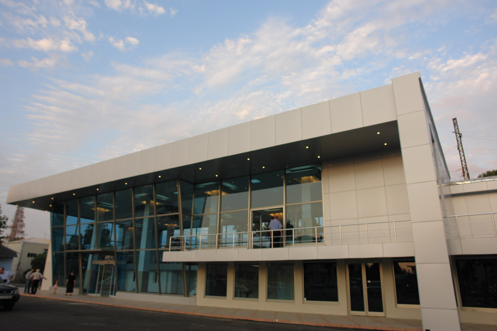 NEW STATIONS in Kobuleti Georgia